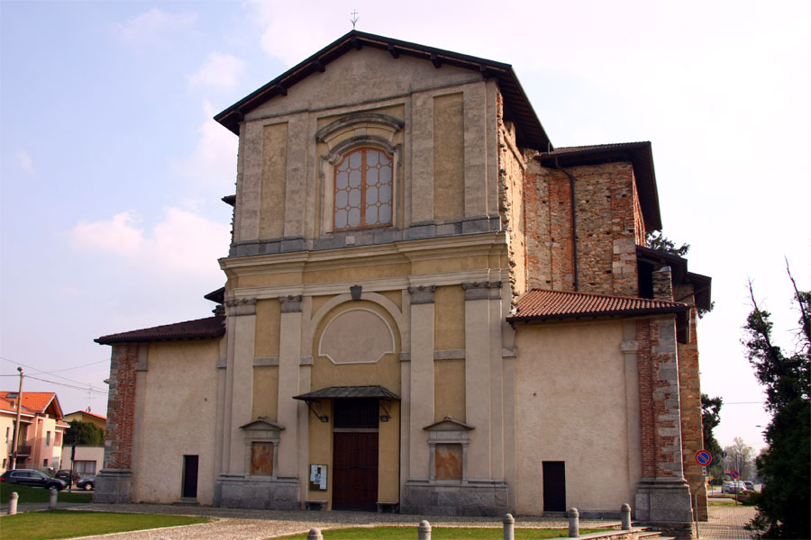 Chiesa di San Rocco a Somma Lombardo - facciata